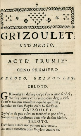 Page de Grizoulet de Pierre Rousset Mort en 1684